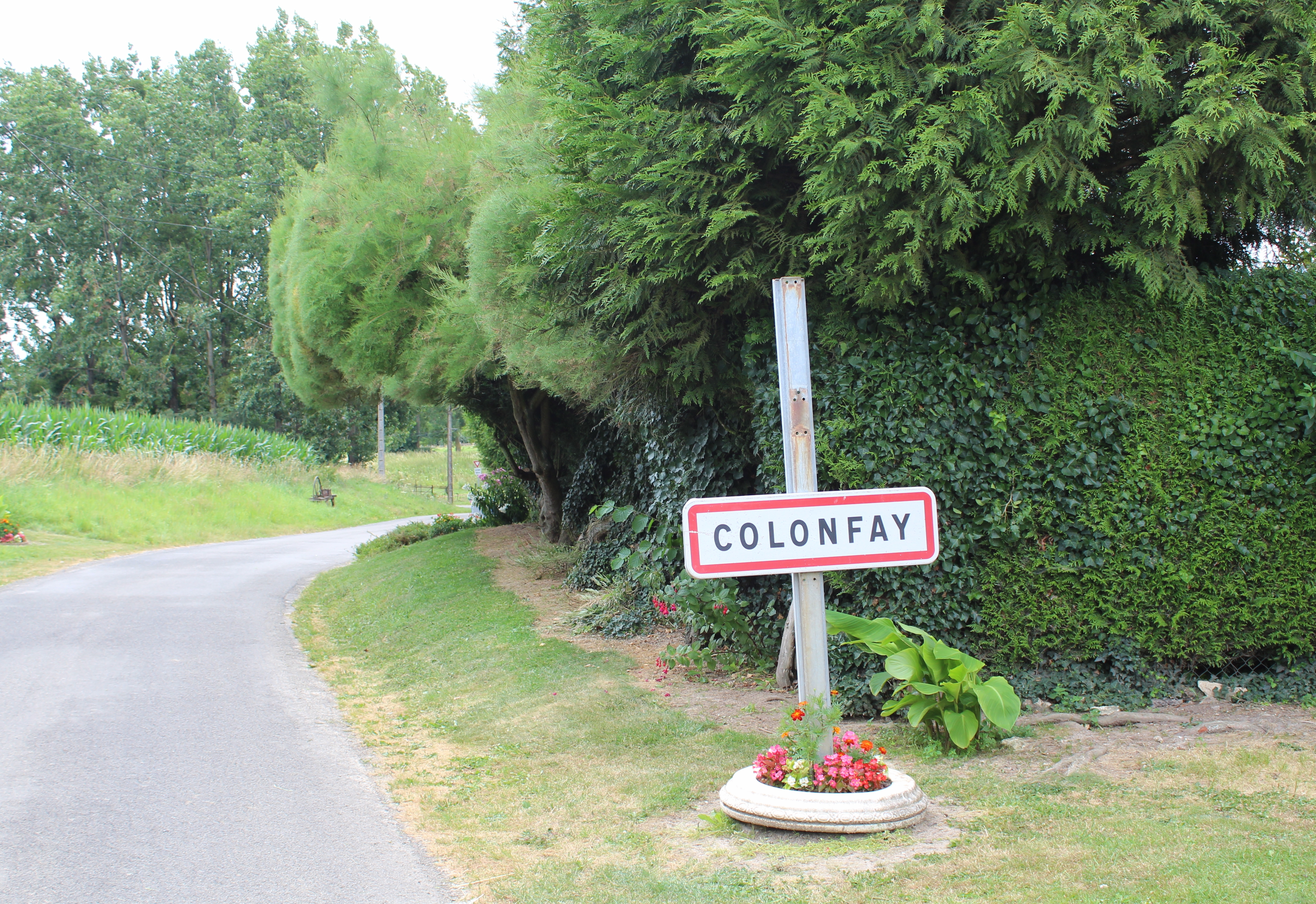 Entrée du village